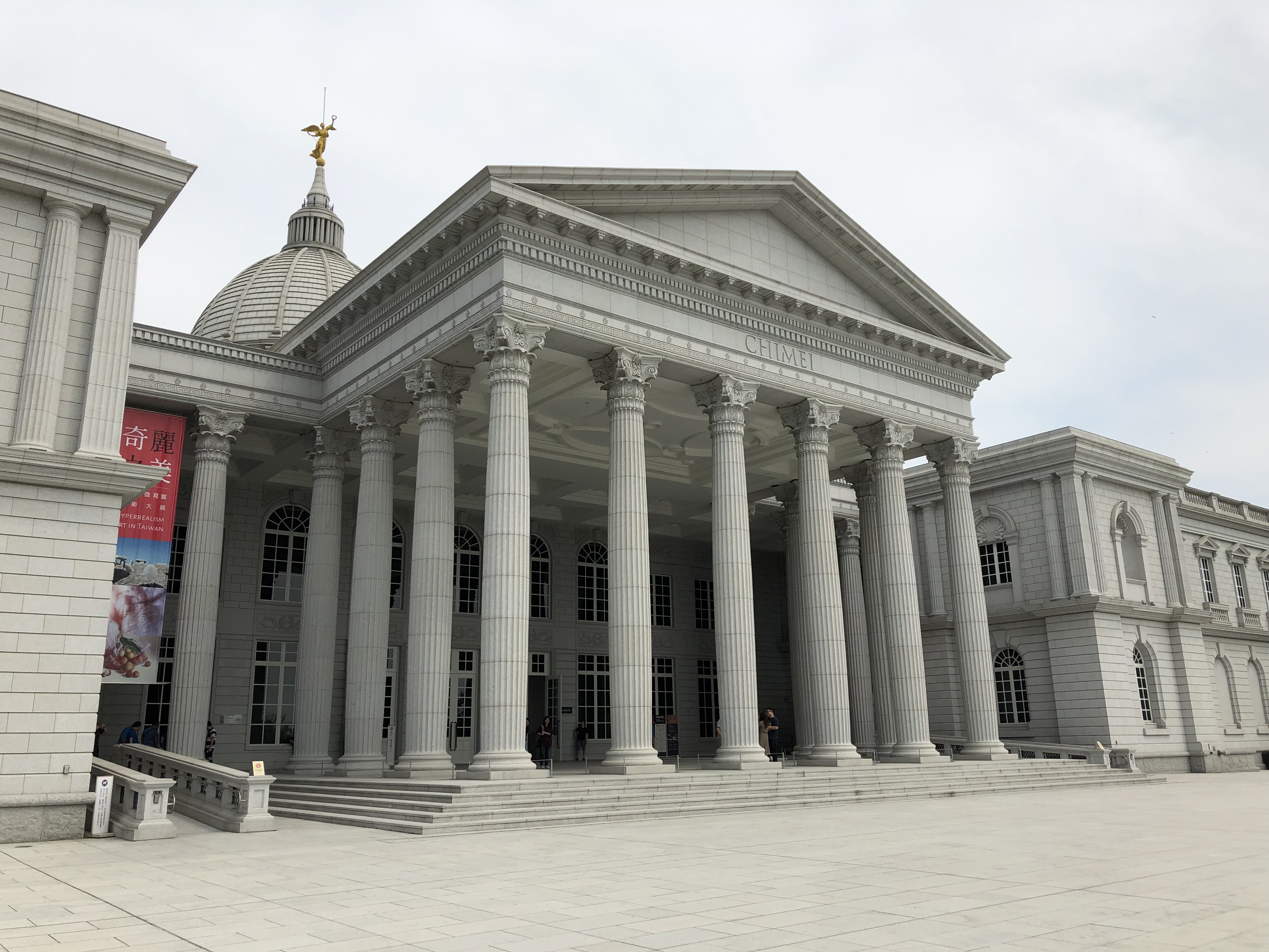 中文（台灣）: 奇美博物館正門。